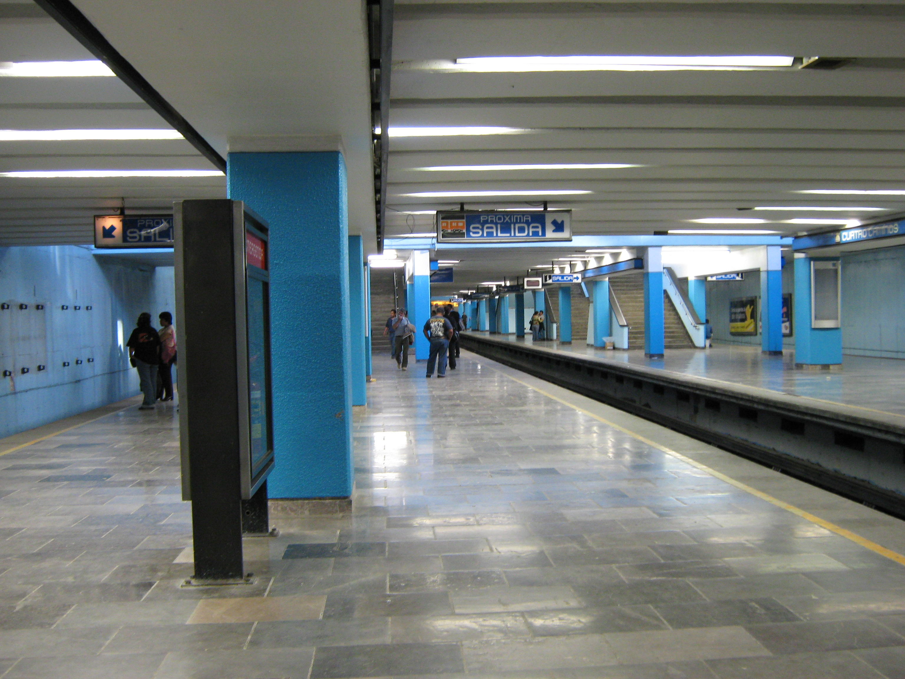 Andenes de la estación Cuatro Caminos del Metro de la Ciudad de México